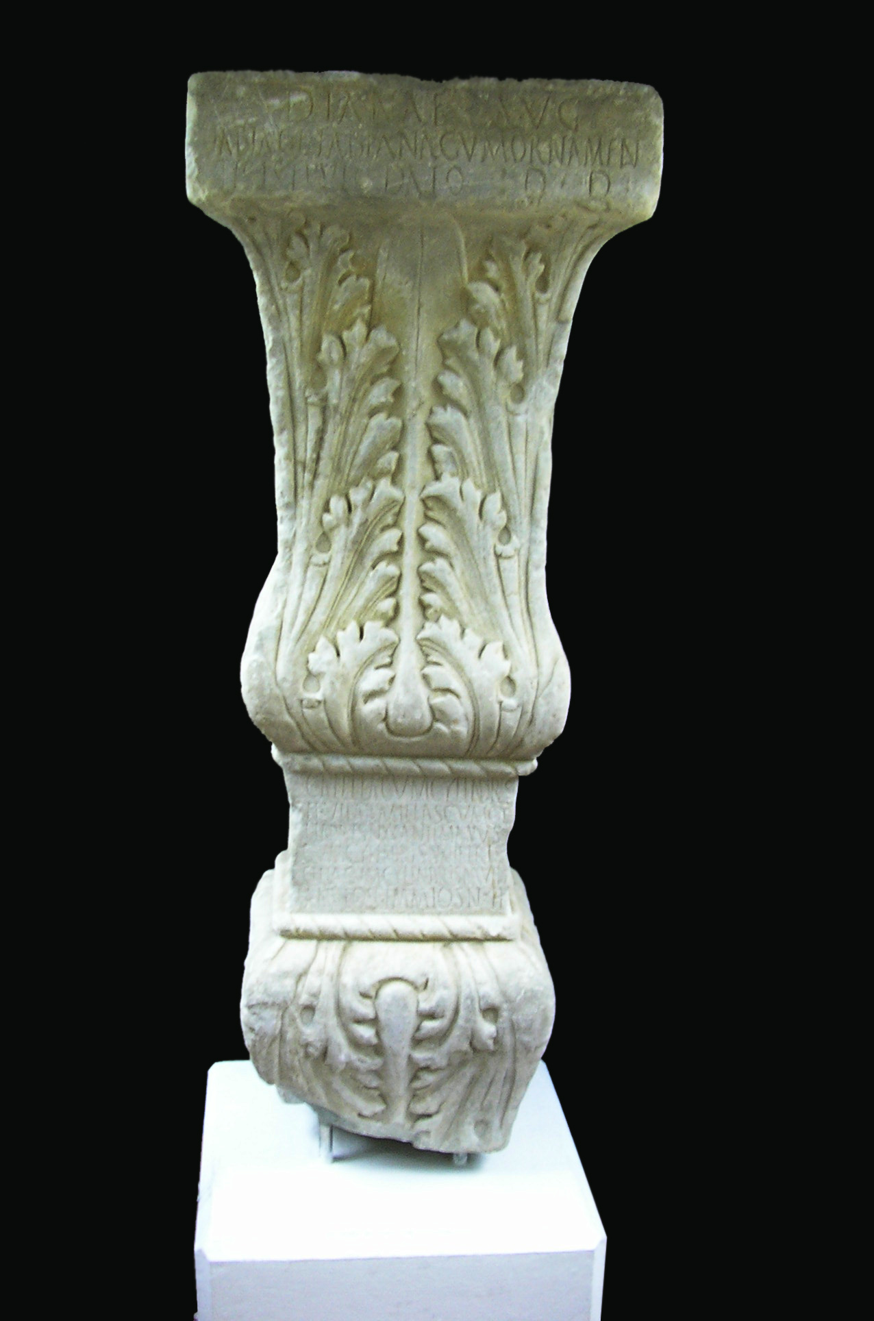 Pedestal votivo dedicado a la Diosa Diana depositado y expuesto en el Museo municipal de Algeciras, Andalucía, España. Esta pieza fue encontrada en una excavación en la calle Alfonso XI, 13 de la ciudad en septiembre de 1972. El pedestal de mármol de Coín tiene una altura de 1,355 m de altura y unos 0,52 m de anchura y se encuentra roto en su base. Está decorado en tres de sus caras estando la cuarta esculpida sin relieve para que el elemento pudiera situarse adosado a una pared. La decoración consta de motivos florales (hojas de acanto) en su cara principal y de figuras antropomorfas y animales muy deterioradas por haberse picado su superficie en las caras laterales. Posee una inscripción relativa a una donación votiva realizada a la diosa Diana por parte de una mujer, Fabiana, hija de Caio. La inscripción se encuentra separada en dos cuerpos, uno en la parte superior y otra en el cuerpo central. En el texto se lee: «DIANAE AUV(ustae) FABIA C(aii) F(ilia) FABIANA CUM ORNAMEN TIS I(infra) S(criptis EPVLO DATO D(onat) D(edicat)» ... «CATELLA CVM CYLINDR(i)S N(umero) VII ARMILLAS CVM CY LINDRIS (numero) XX ANTEMANUS CVM CYLINDRIS N(umero) XIII PERIS CELIA CVM CYLINDRIS N(umero) XVIII AN(n)VLOS GEMMAIOS N(umero) II» Traducido según Presedo Velo, Francisco J. (1974) como: “Fabia Fabiana, hija de Caio, con los ornamentos infrascritos, una vez celebrado el banquete dona y dedica: ... Una cadenilla con siete piedras, pulseras con veinte piedras, brazalete con trece piedras, una ajorca con dieciocho piedras, dos anillos con gemas.” Cronológicamente se sitúa en la primera mitad del siglo II y diversos investigadores indican que la pieza podía proceder originalmente de la ciudad de Barbesula atendiendo a los nombres que aparecen en su inscripción y trasladada durante la Edad Media a Algeciras (lo que explicaría que los relieves antropomorfos se encuentren borrados debido a la prohibición del Islam de representar figuras humana).